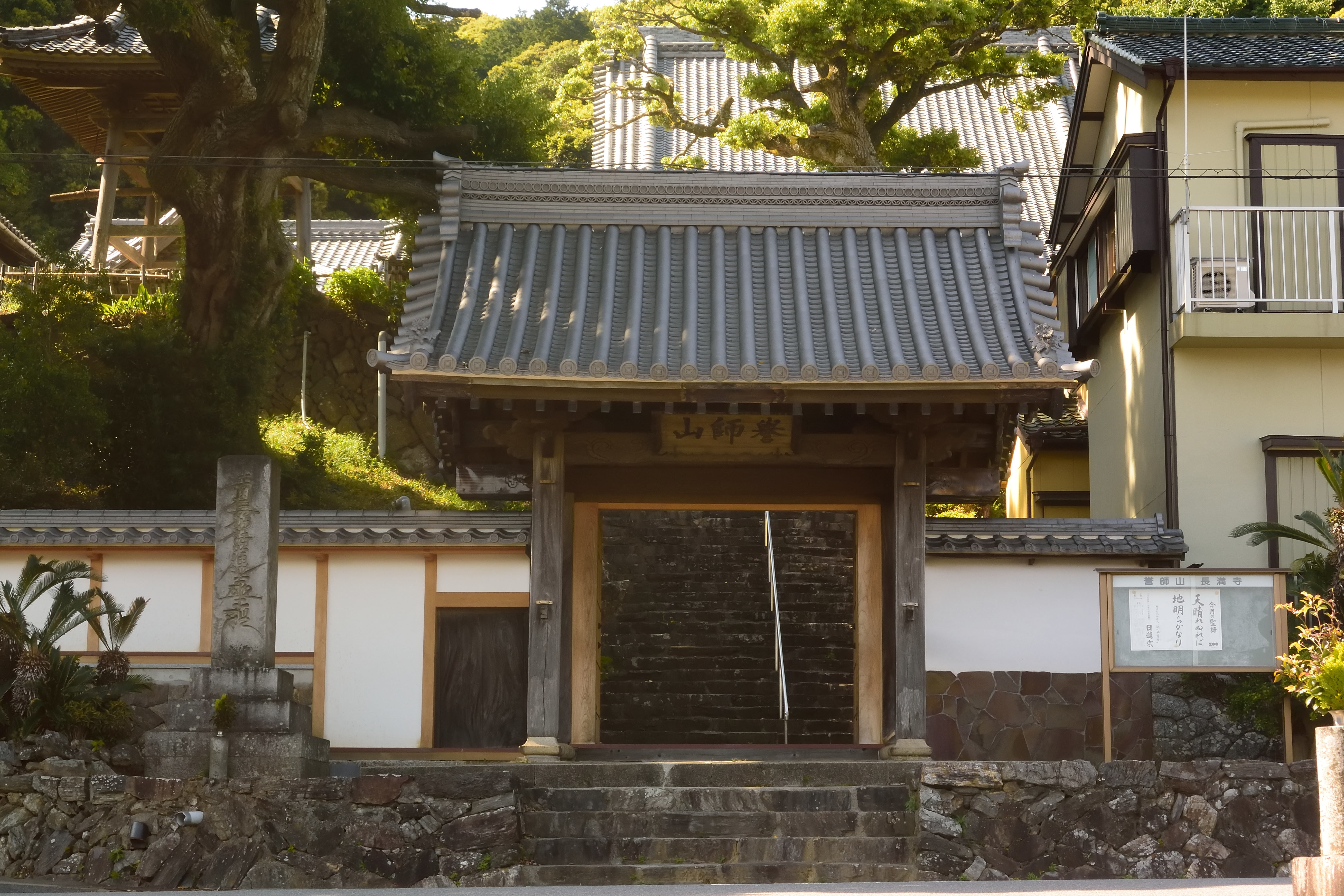 長満寺山門